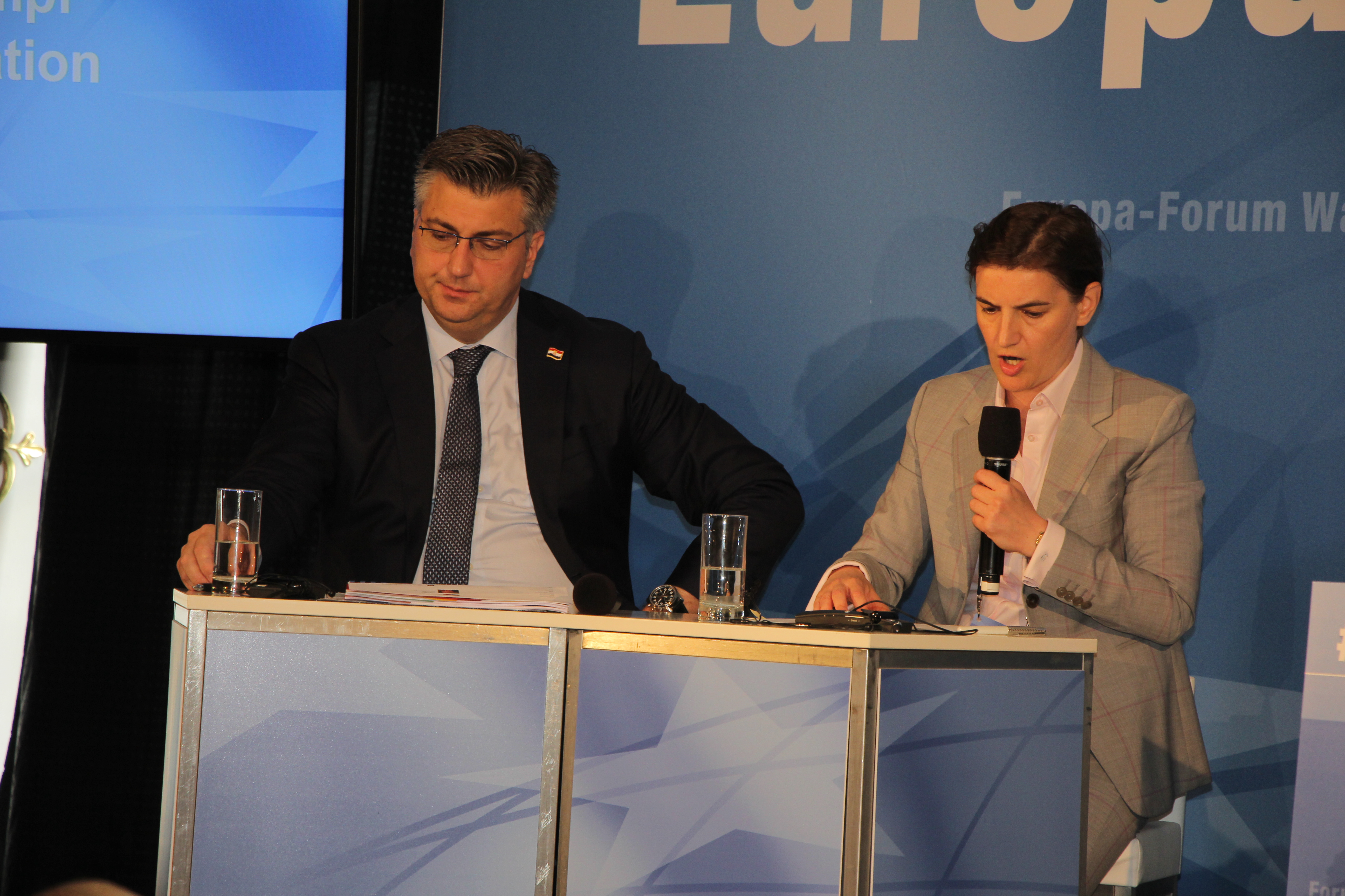 Europaforum Wachau 2018 auf Stift Göttweig